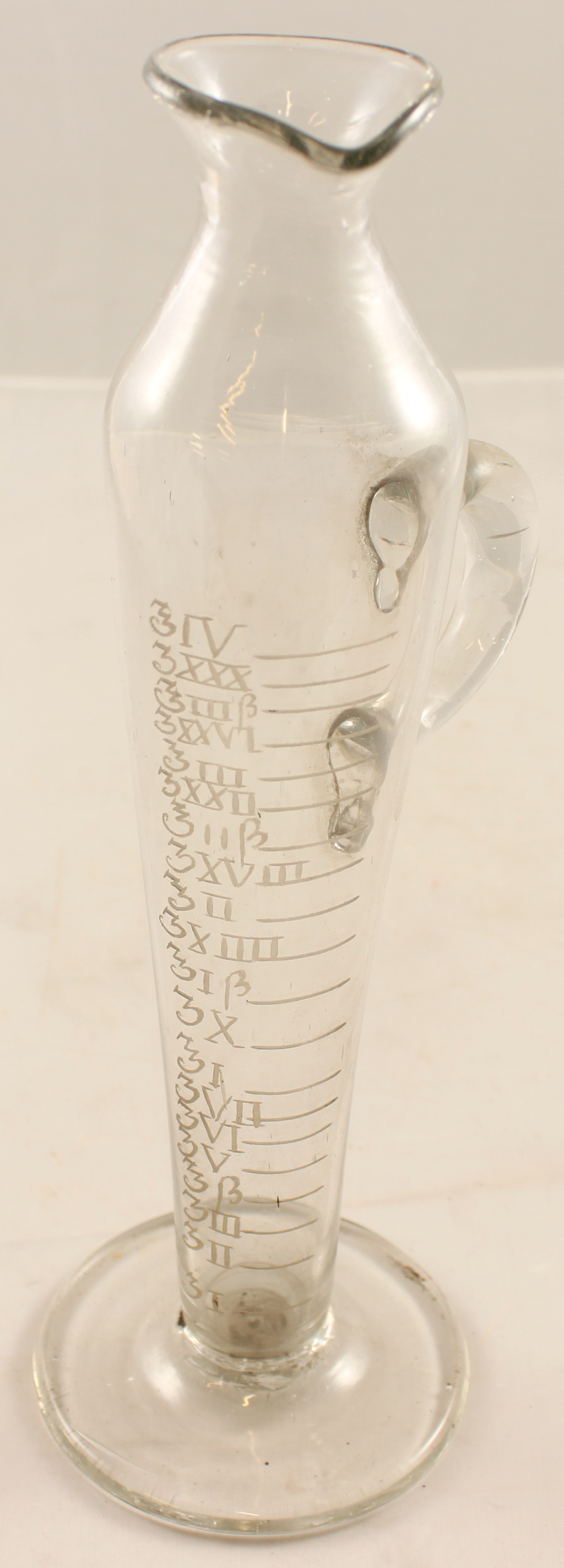 Amphorenförmiges Gefäß aus weißem Glas, mit angesetztem Henkel und Ausguß, auf flacher Bodenplatte stehend. Nutzung als Messzylinder daher mit den Maßeinheiten "Drachmen" und "Unzen" beschriftet.